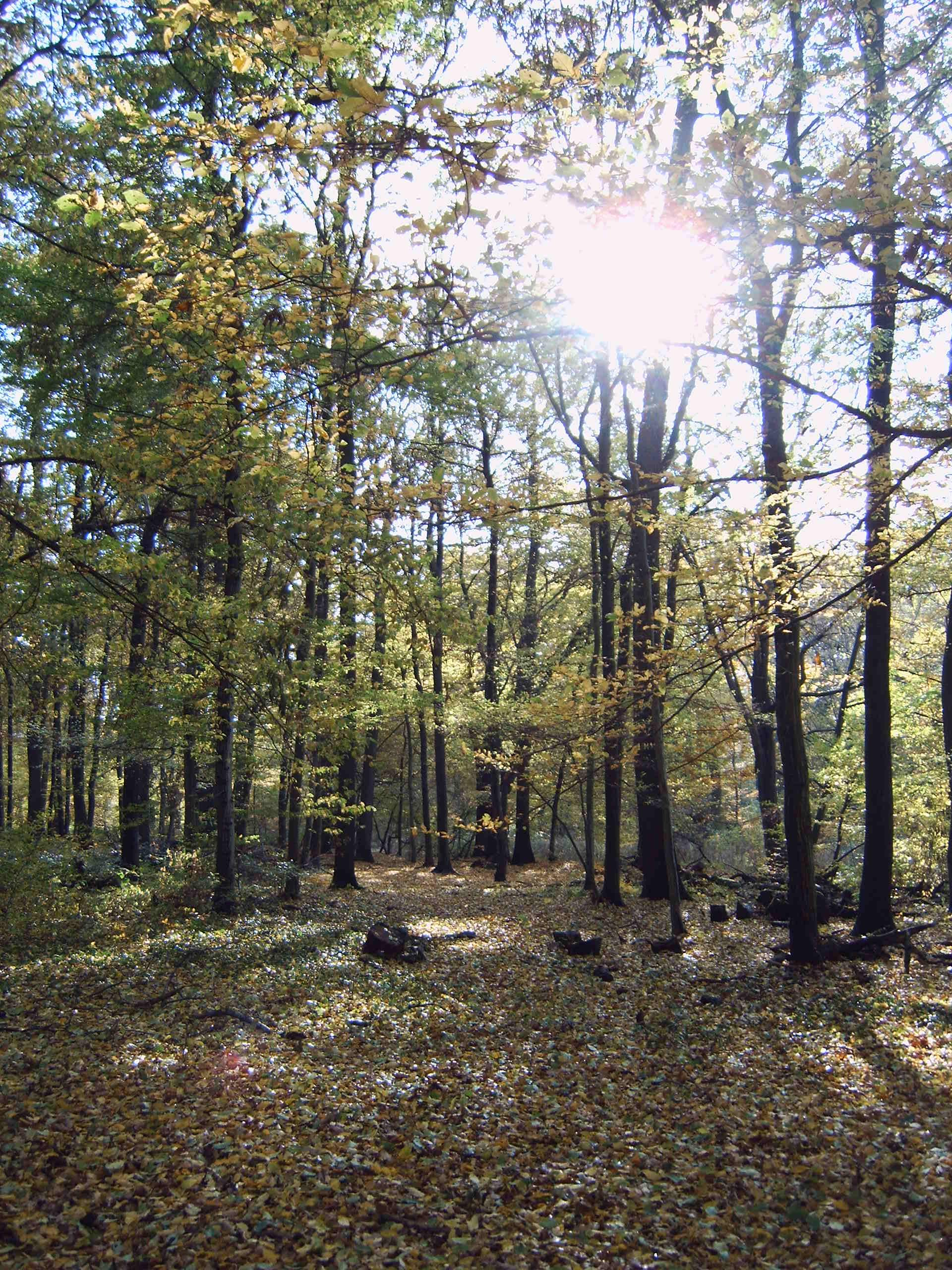 Hakel, Saxony-Anhalt, Germany